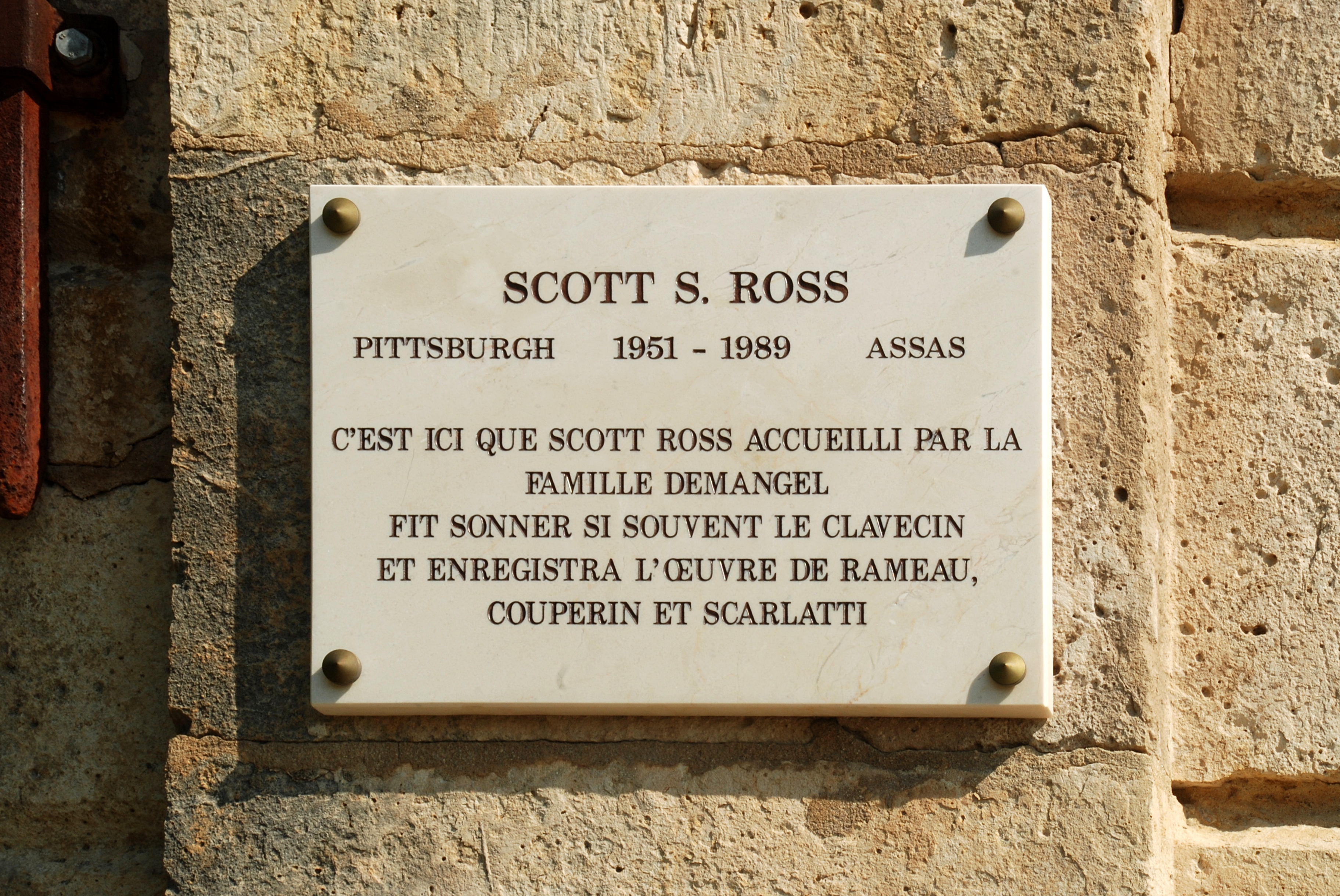 France - Languedoc - Hérault - Château d'Assas